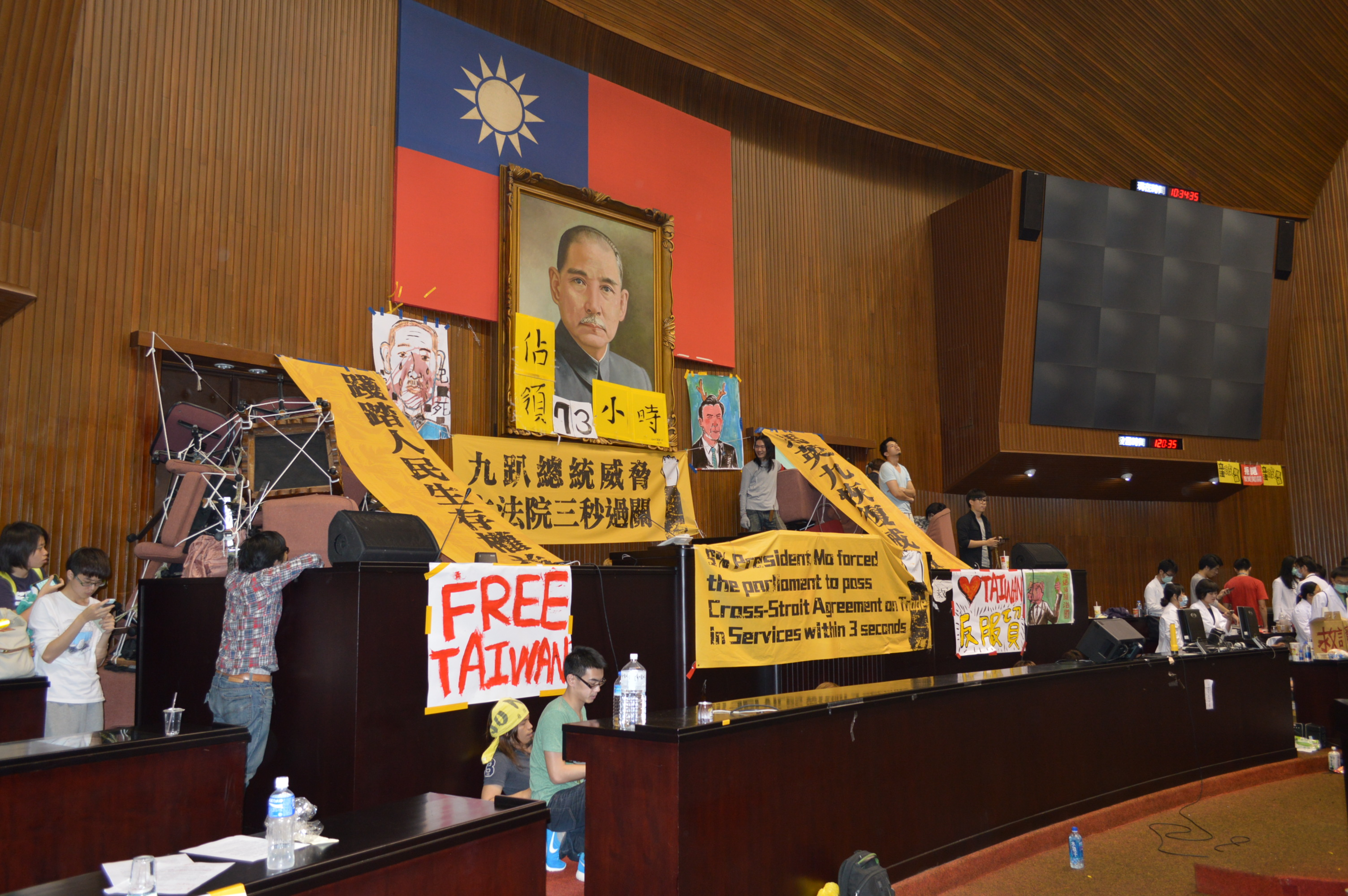 3月20日立院主席臺。